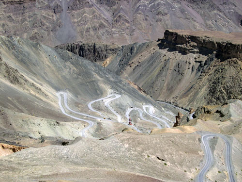 Paisatge prop de Lamayuru. Ladakh, Índia